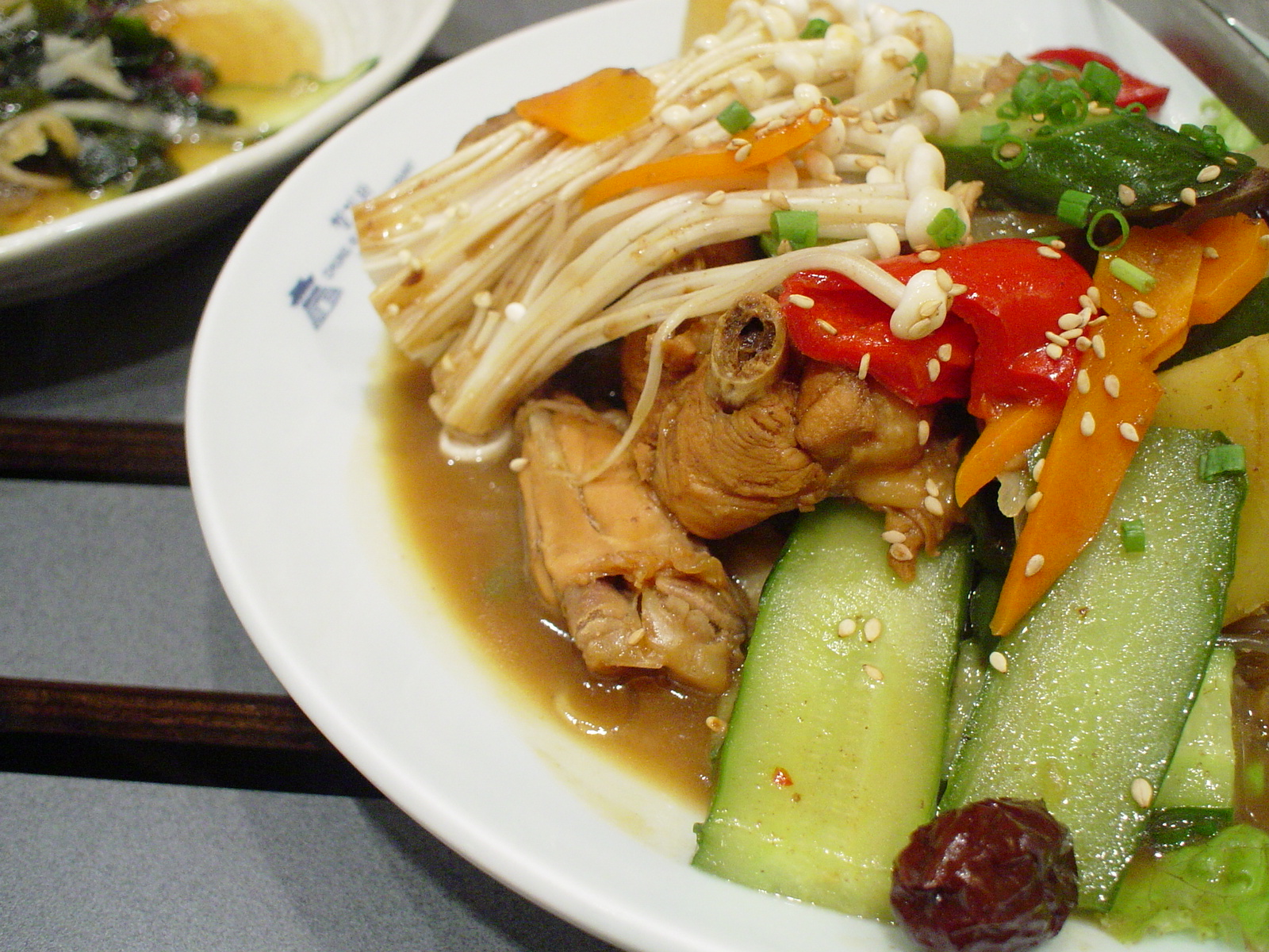 Andong jjimdak, a Korean dish